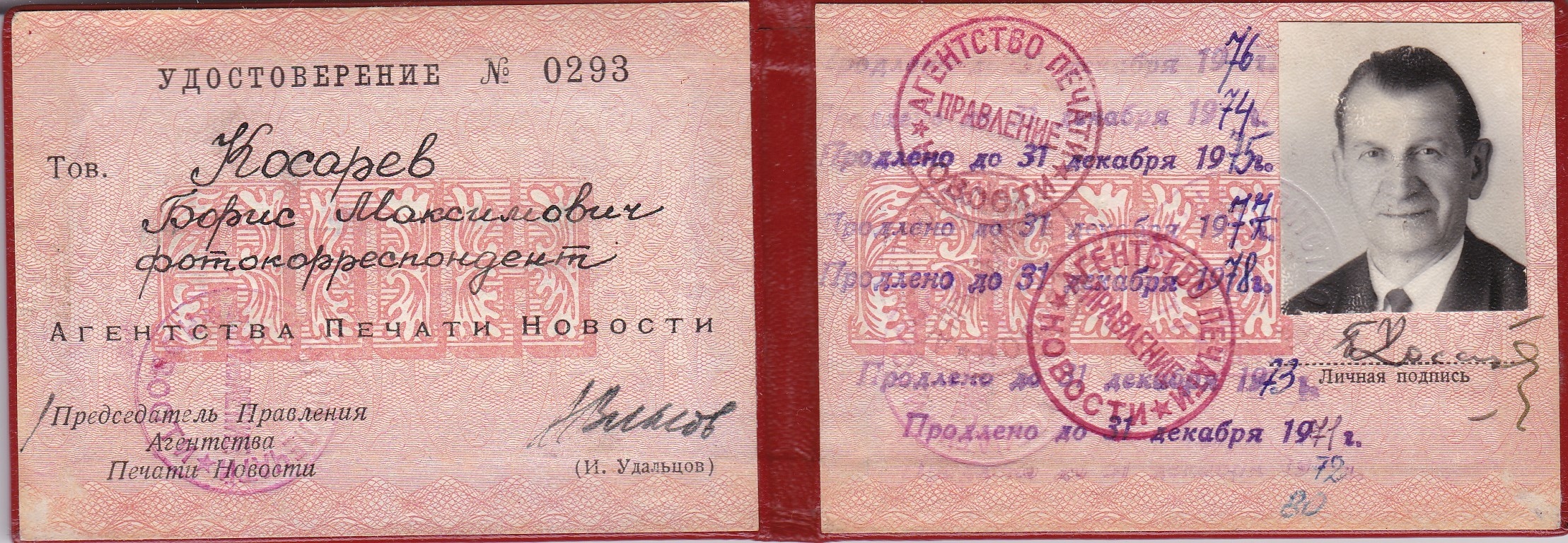 Удостоверение фотокорреспондента Бориса Косарева, Агентство Печати Новости